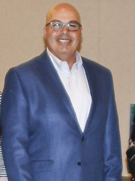 IMG_4359a